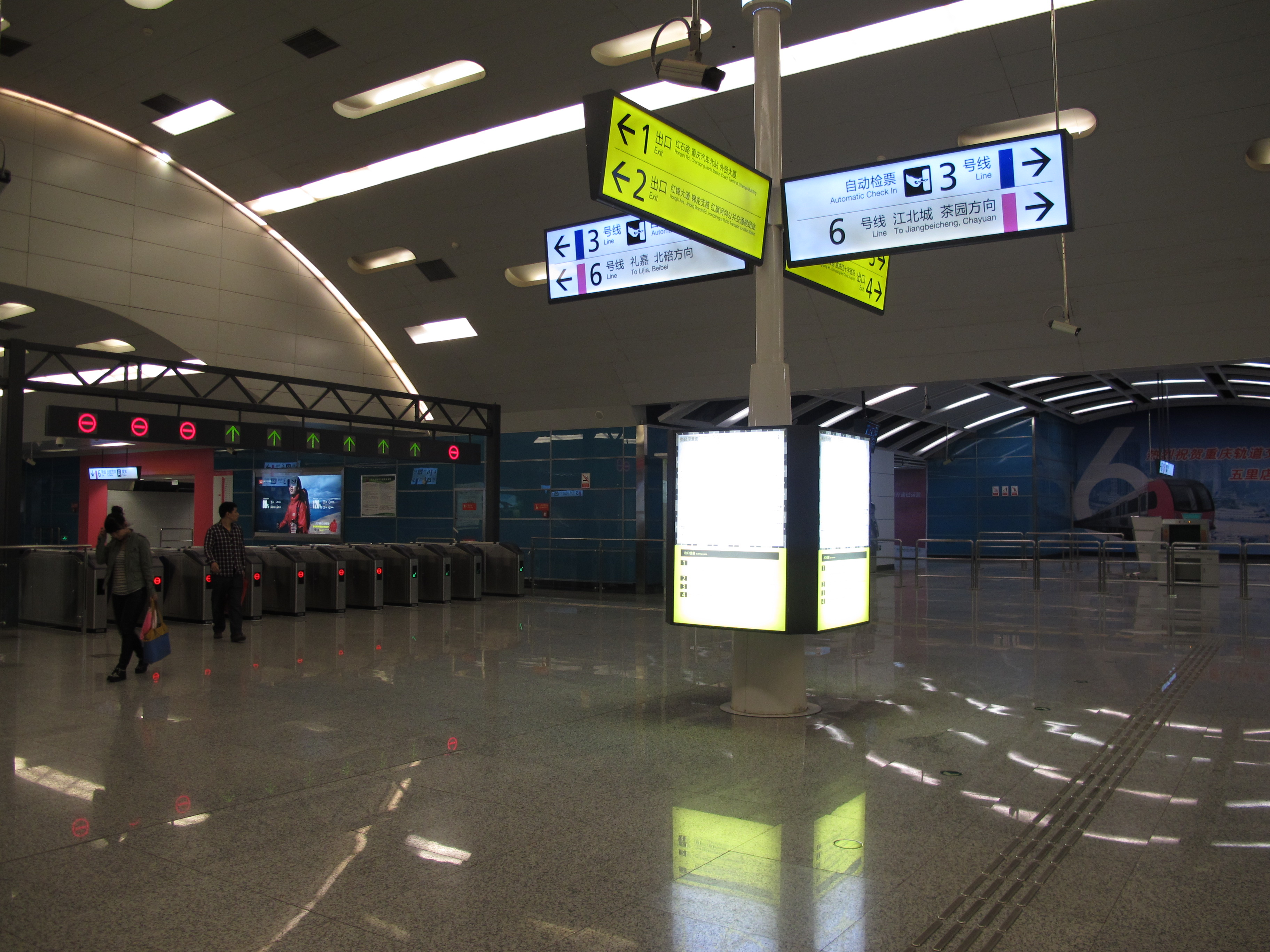 重庆轨道交通 红旗河沟站 进站后大堂实景